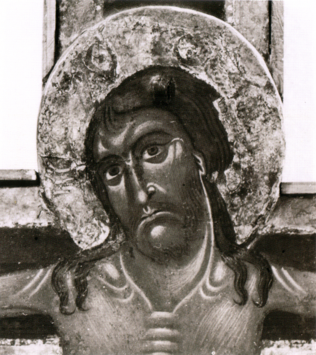 Maestro della croce 434, crocifisso del museo bandini, dettaglio